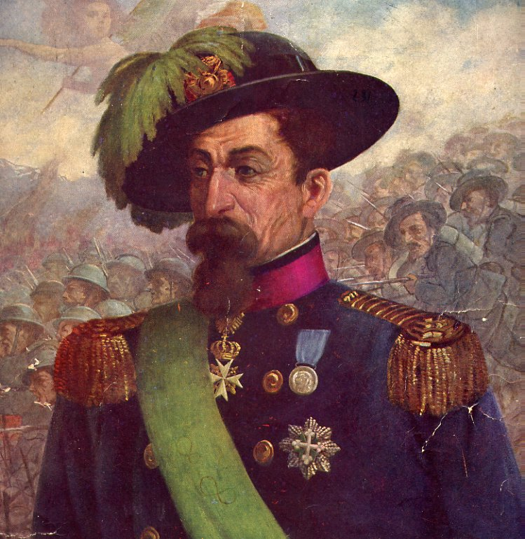 Il generale e senatore Alessandro La Marmora.